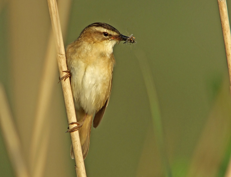 Acrocephalus schoenobaenus, phragmite des joncs.